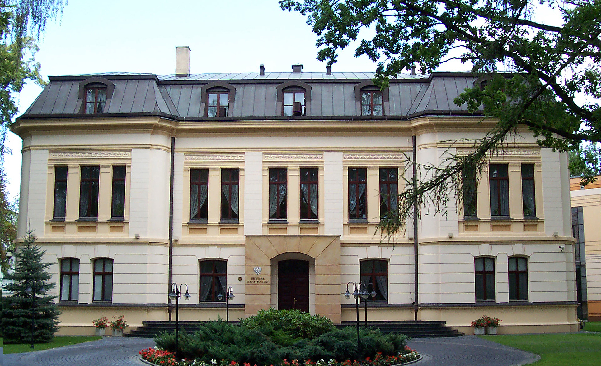 Warszawa - Trybunał Konstytucyjny